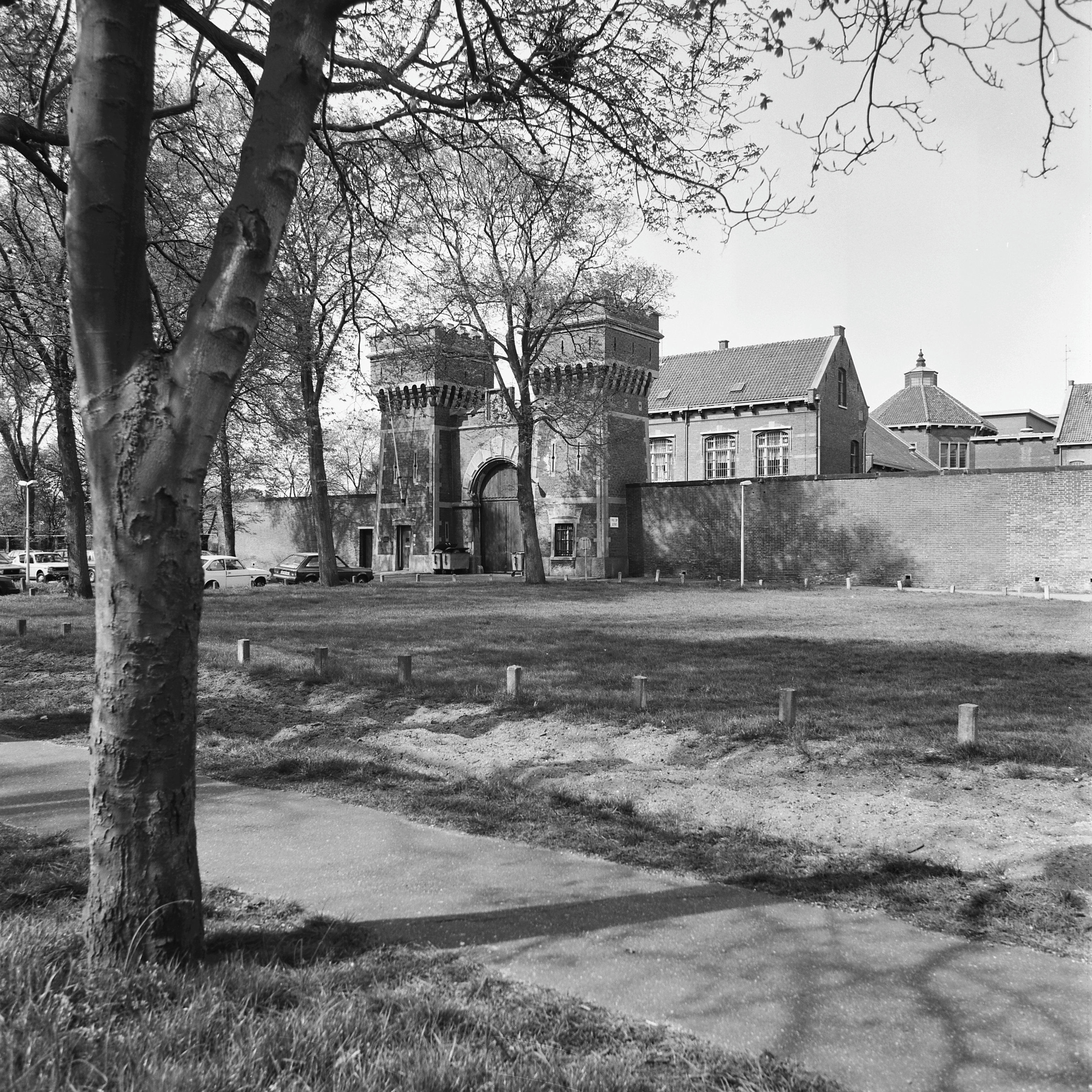 poort gevangenis